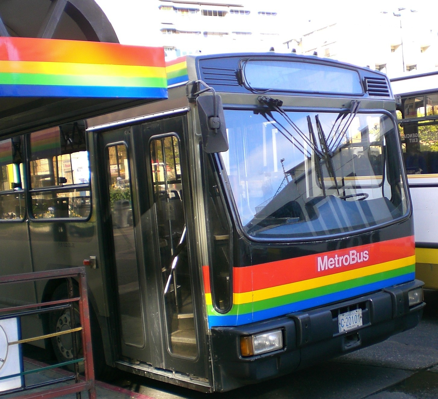 Old MetroBus unit, Caracas, Venezuela